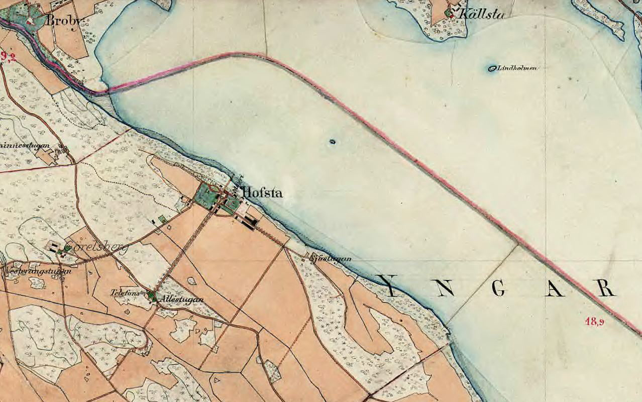 Hofsta herrgård med omgivning på Häradsekonomiska kartan